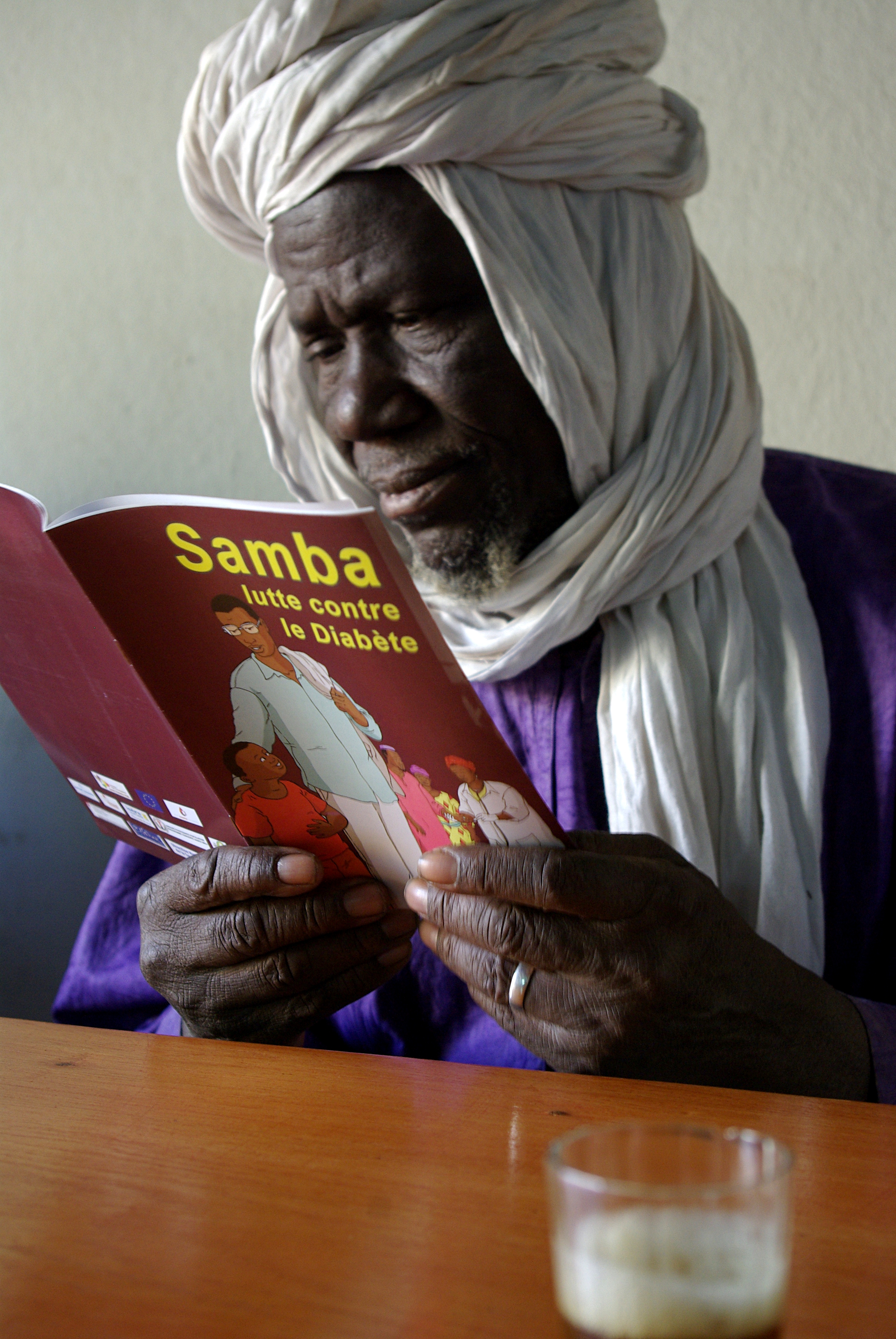 Olivier Hebrard, OTRS pending